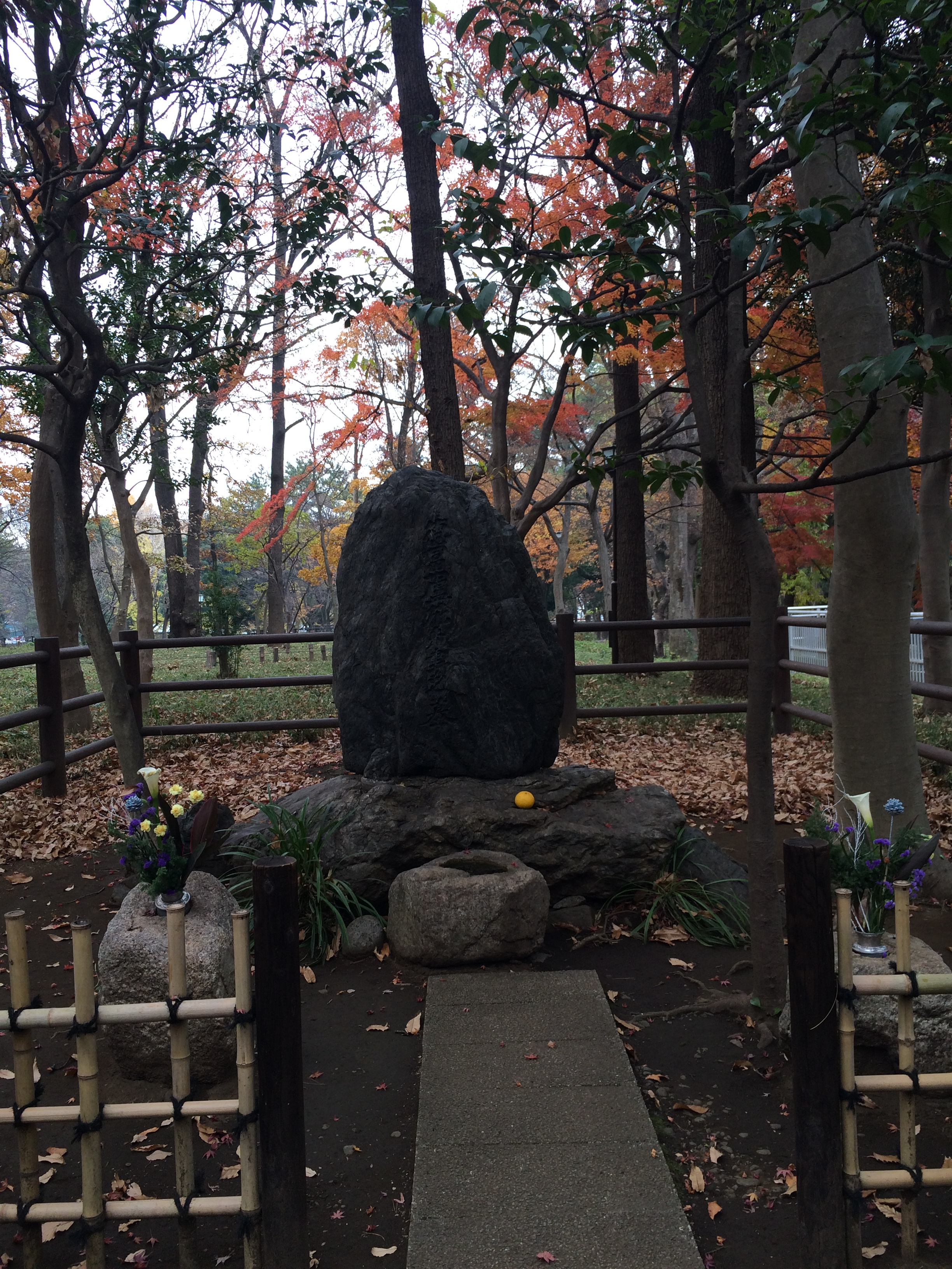 蘆花恒春園 徳富蘆花夫妻墓地